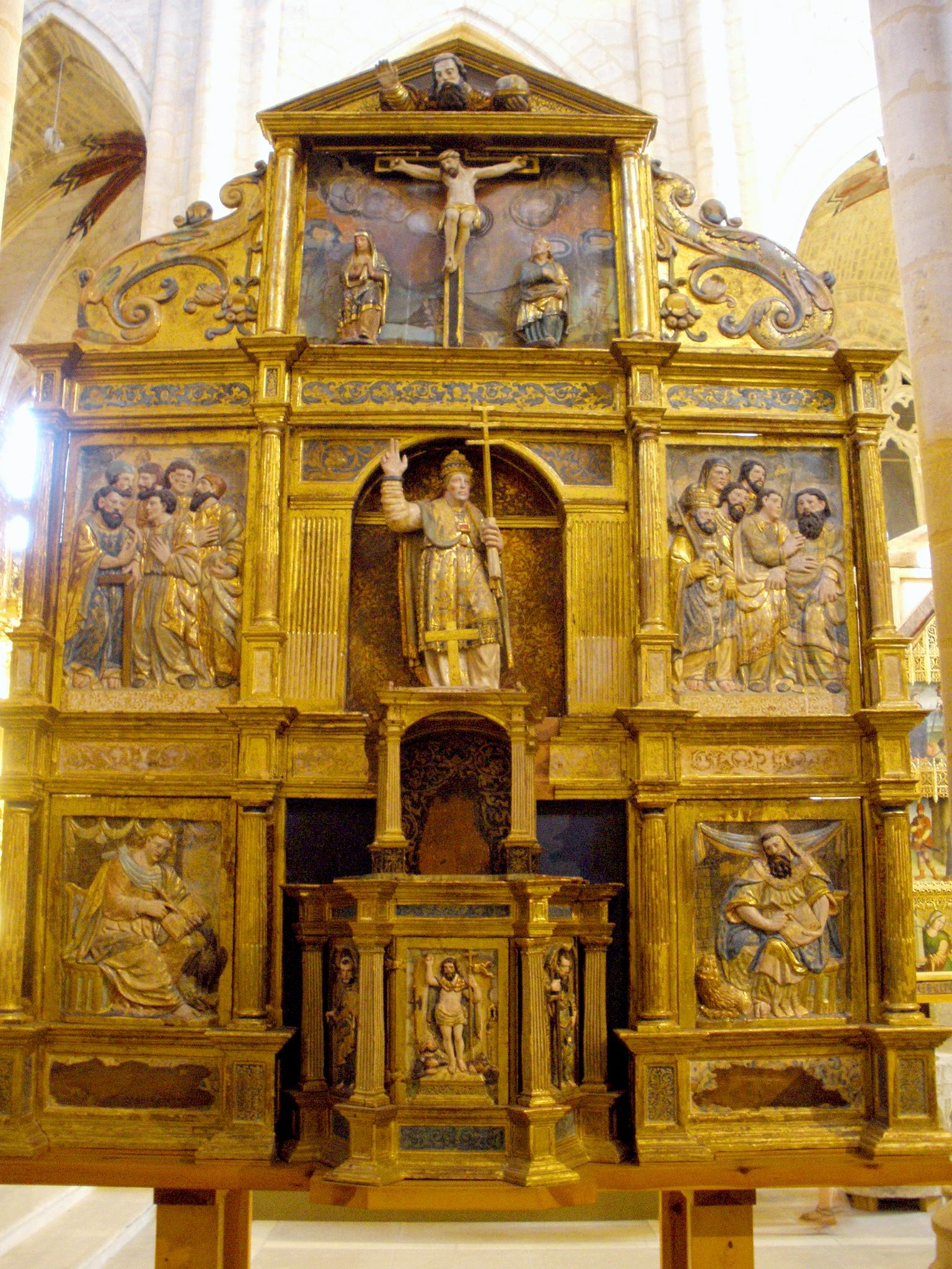 Retablo de San Clemente (s-XVI), procedente de Huidobro. En el Museo del Retablo-Iglesia de San Esteban, Burgos (Castilla y León, España)